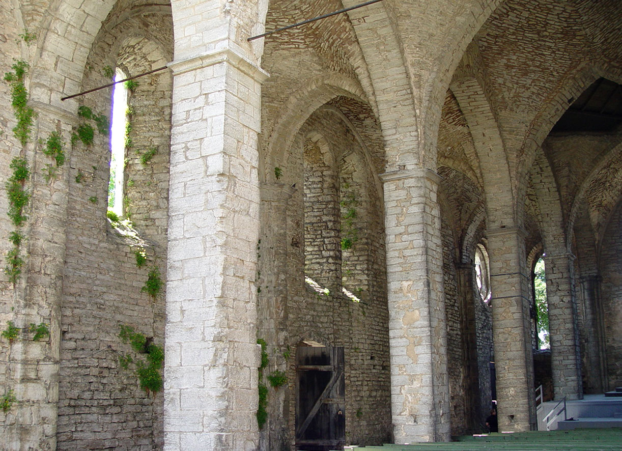 Kirchenruine St.Nicolai (St.Nicolaus) in Visby (Gotland). Erbaut 1230, zerstört 1525